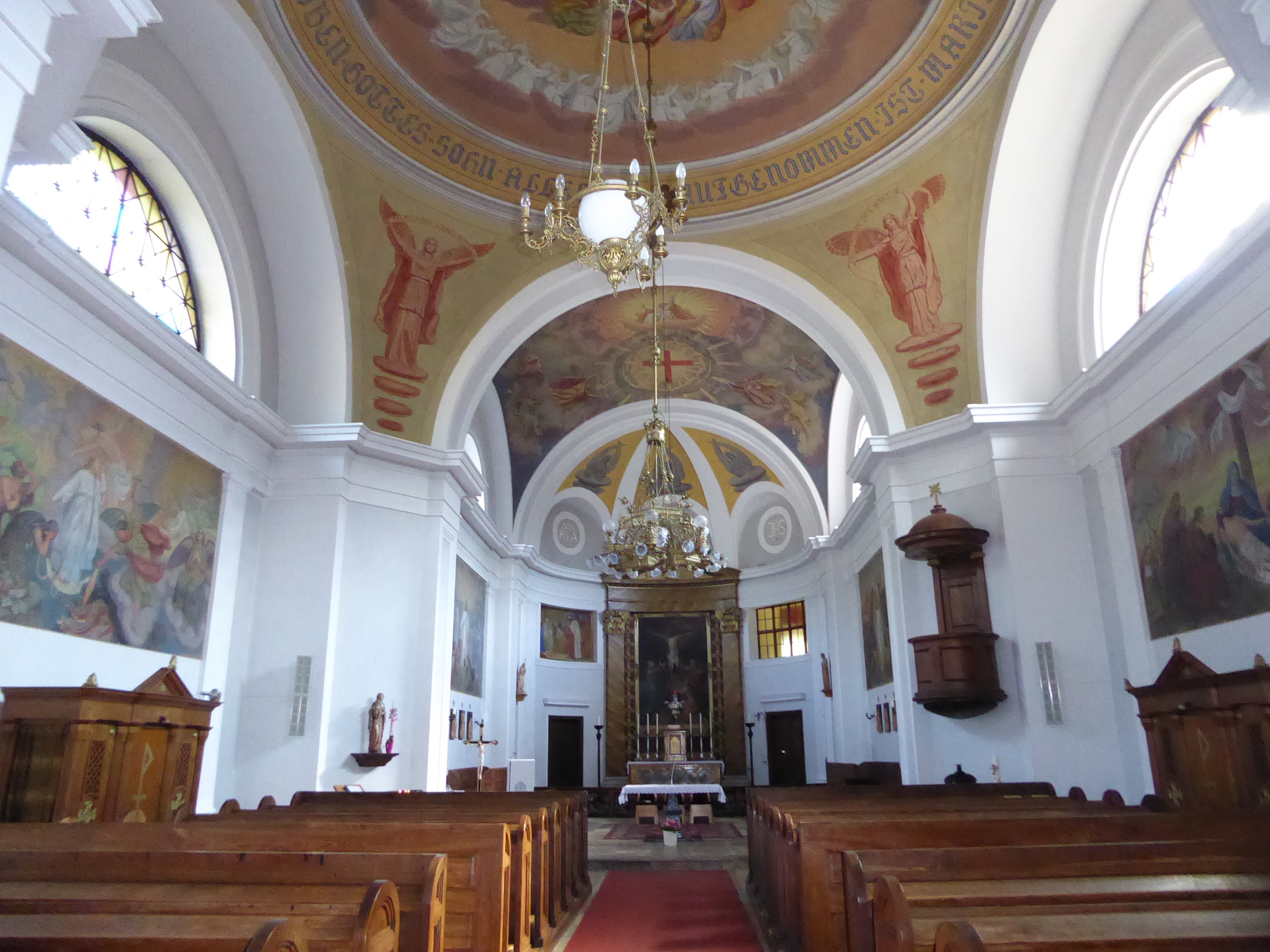 Pfarrkirche zum hl. Kreuz, Kirchenplatz, Gußwerk, Mariazell, Steiermark, Österreich